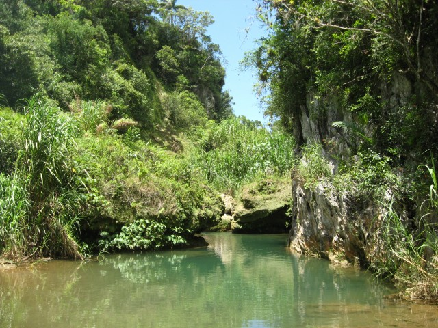 El Nicho, Escambray